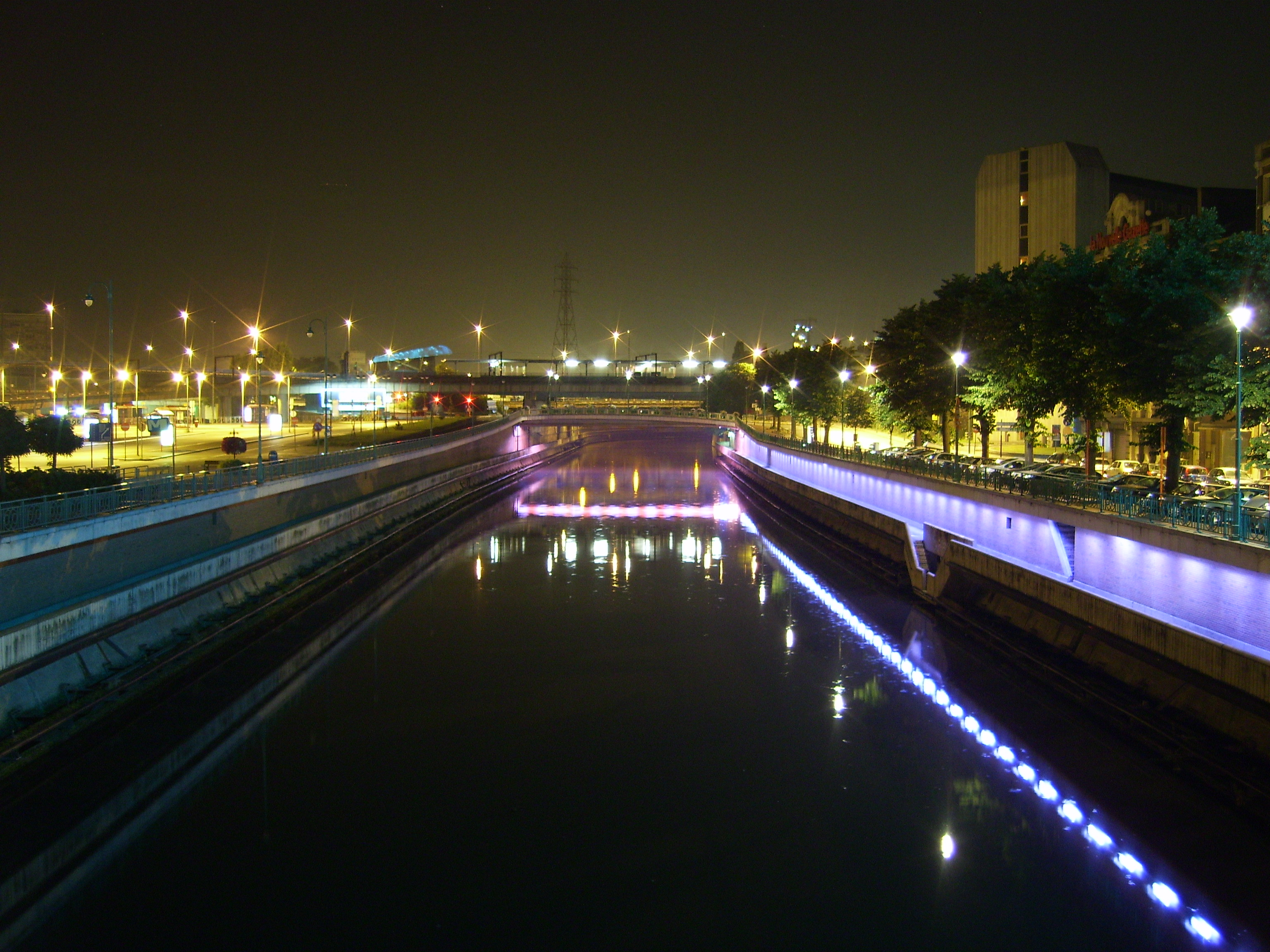 eigen werk Ruben Alexander